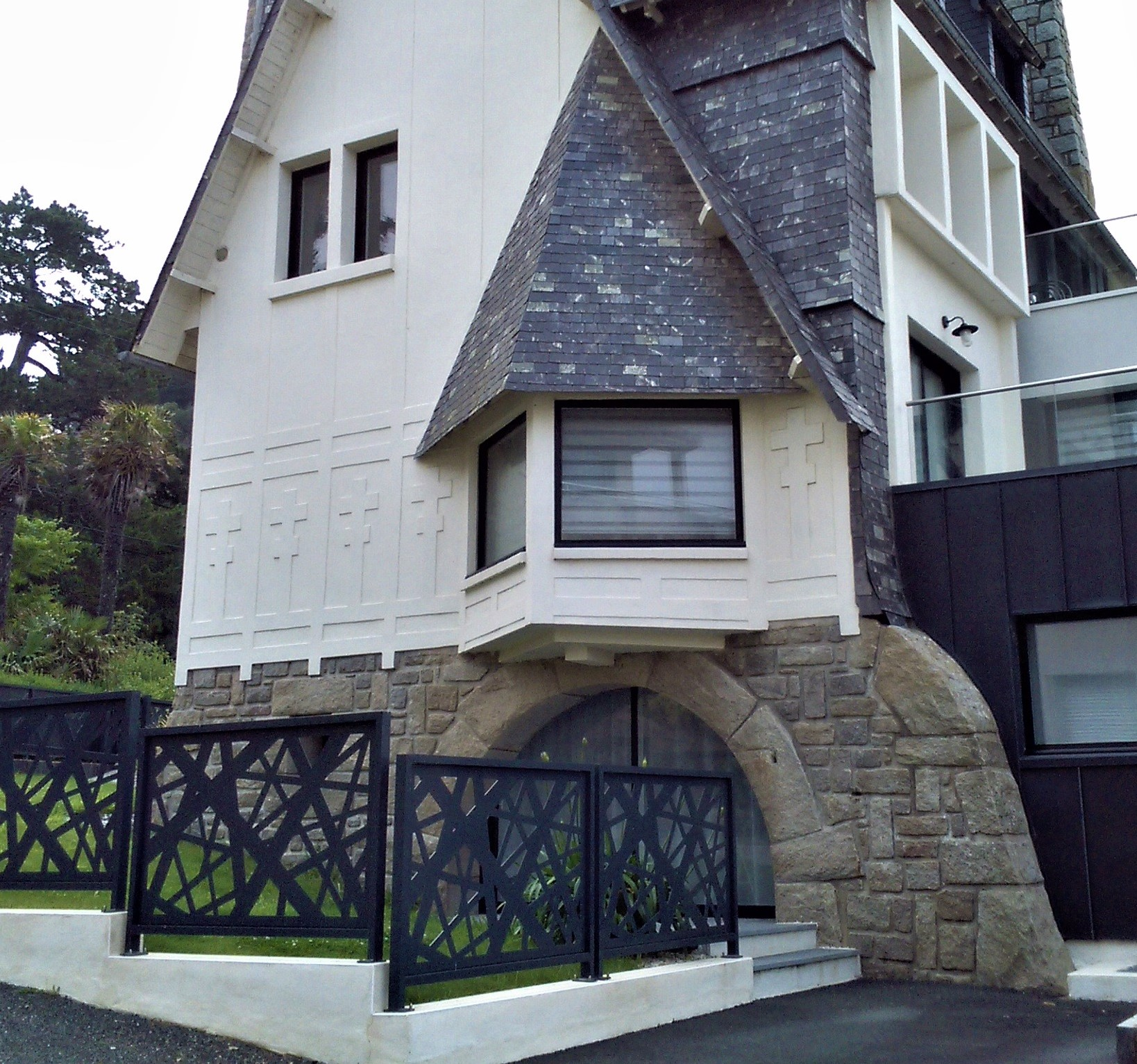 Vues diverses de Trébeurden fin juin 2019 : à l'angle de la rue Traou-Meur et de la traverse de Trez-Meur descendant à la plage de Tresmeur.